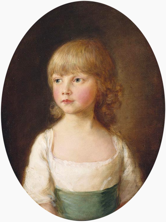 Portrait de la princessse Sophia, agée de 5 ans